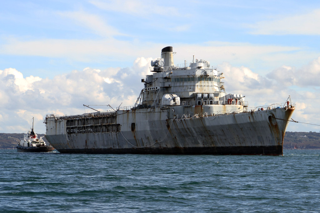 Dernier voyage de la Jeanne d'Arc, départ de Brest le 11 octobre 2014.